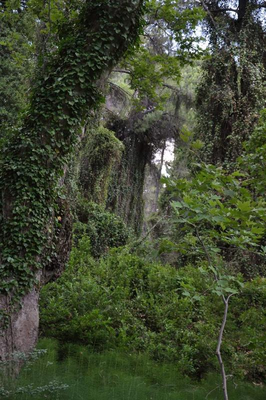 "puszczański matecznik" - Tatoi, Attyka, Grecja, dawny park królewski, obecnie Park Narodowy Góry Parnitha, 25 km od Akropolu w Atenach